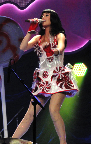 Katy Perry en Seattle, 2011